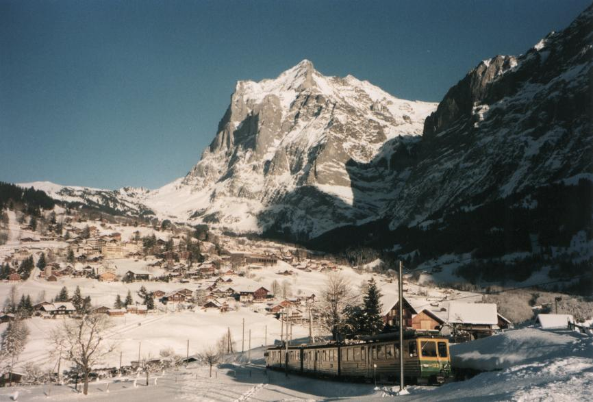 Description